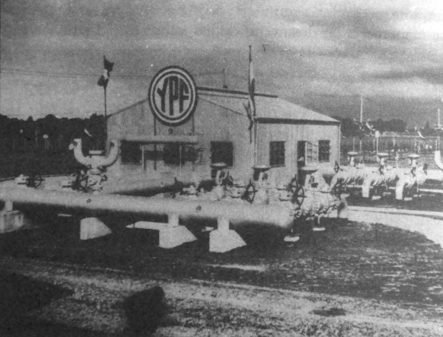 Son válvulas separadoras del Gasoducto Campo Durán, en General Pacbeco.